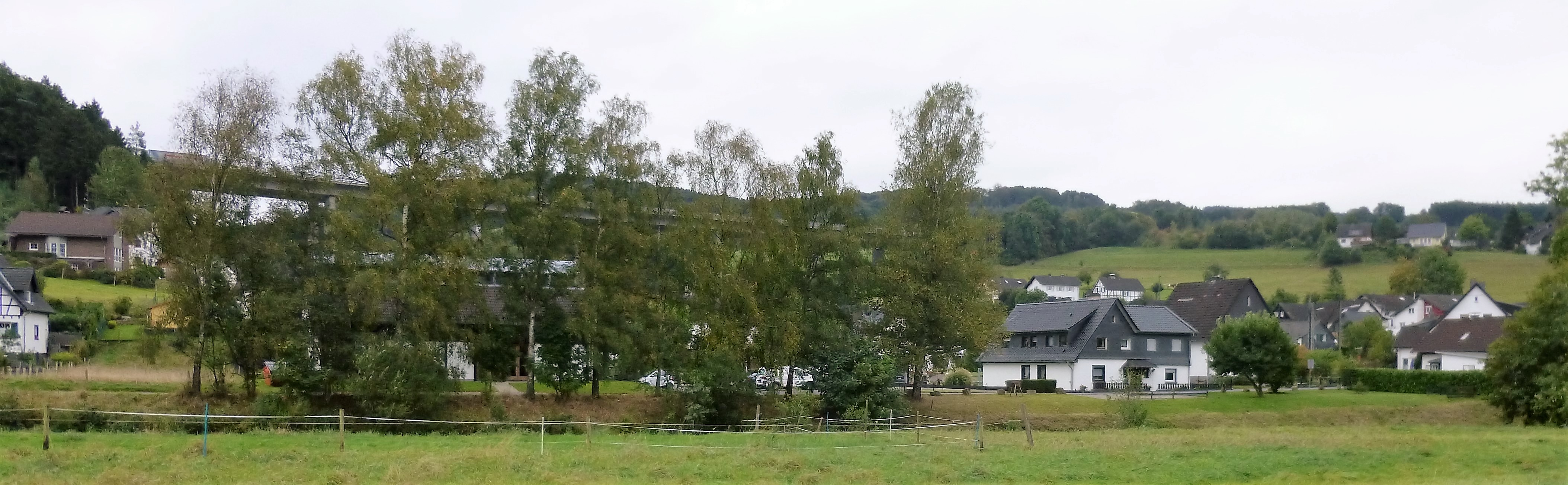 Blick auf Schiffarth